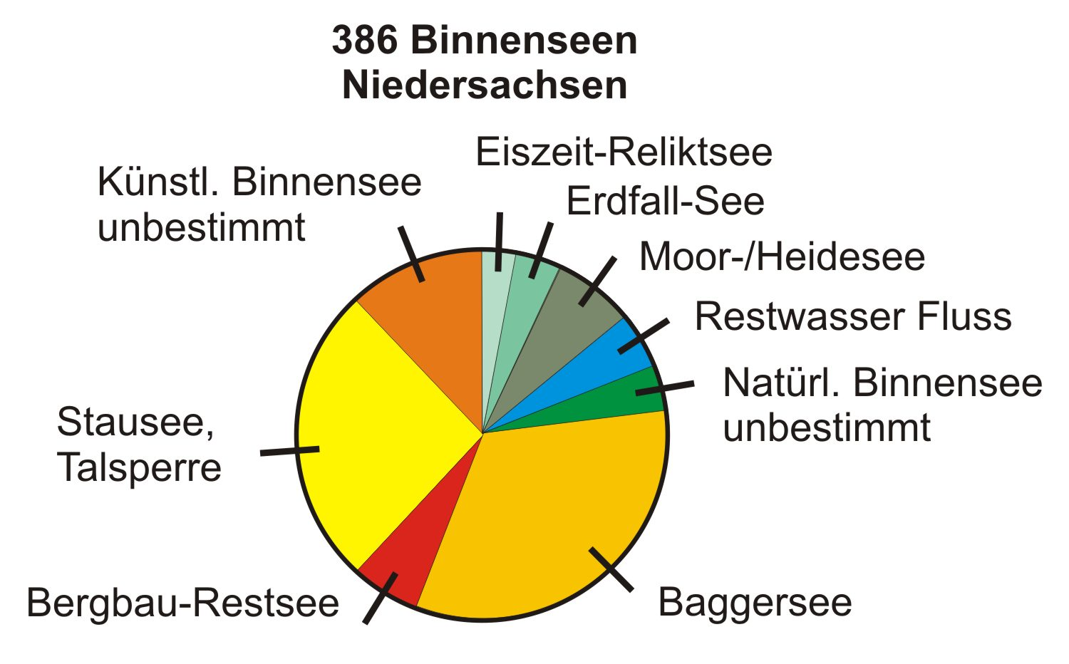 Binnenseen in Niedersachsen, statistische Auswertung auf der Basis von 386 Seen. Grundlage war die Liste der Seen in Niedersachsen in Wikipedia, Stand 30.10.2014. Daten: 89 Natürlich gesamt, davon 12 Eiszeitlicher Reliktsee, Grundmoränensee, 16 Erdfall, 27 Moorsee, Heideweiher, 19 Altwasser, Seeartige Flusserweiterung, 1 Sturmflut-Restwasser, 14 Natürlich unbestimmt, 297 künstlich gesamt, davon 128 Baggersee, 24 Ziegelteich, Braunkohletagebau-Restsee, Torfabbau, Klärteich, Steinbruch, Floßteich, 100 Talsperre, Stausee, Pumpspeicherkraftwerk, Ehemaliges Hafenbecken, Mahlbusen, Künstlicher Fischteich, 45 Künstlich unbestimmt (fast alles Baggerseen). Seen, die 2014 weder in Google Maps einen Namen hatten, noch in Wikipedia oder in Commons verzeichnet waren, sind nicht mit aufgenommen. Dies betraf vor allem Baggerseen. Schätzungsweise sind deswegen nur etwa 10-20 % der Baggerseen in der Statistik enthalten. Grafik: F. Welter-Schultes